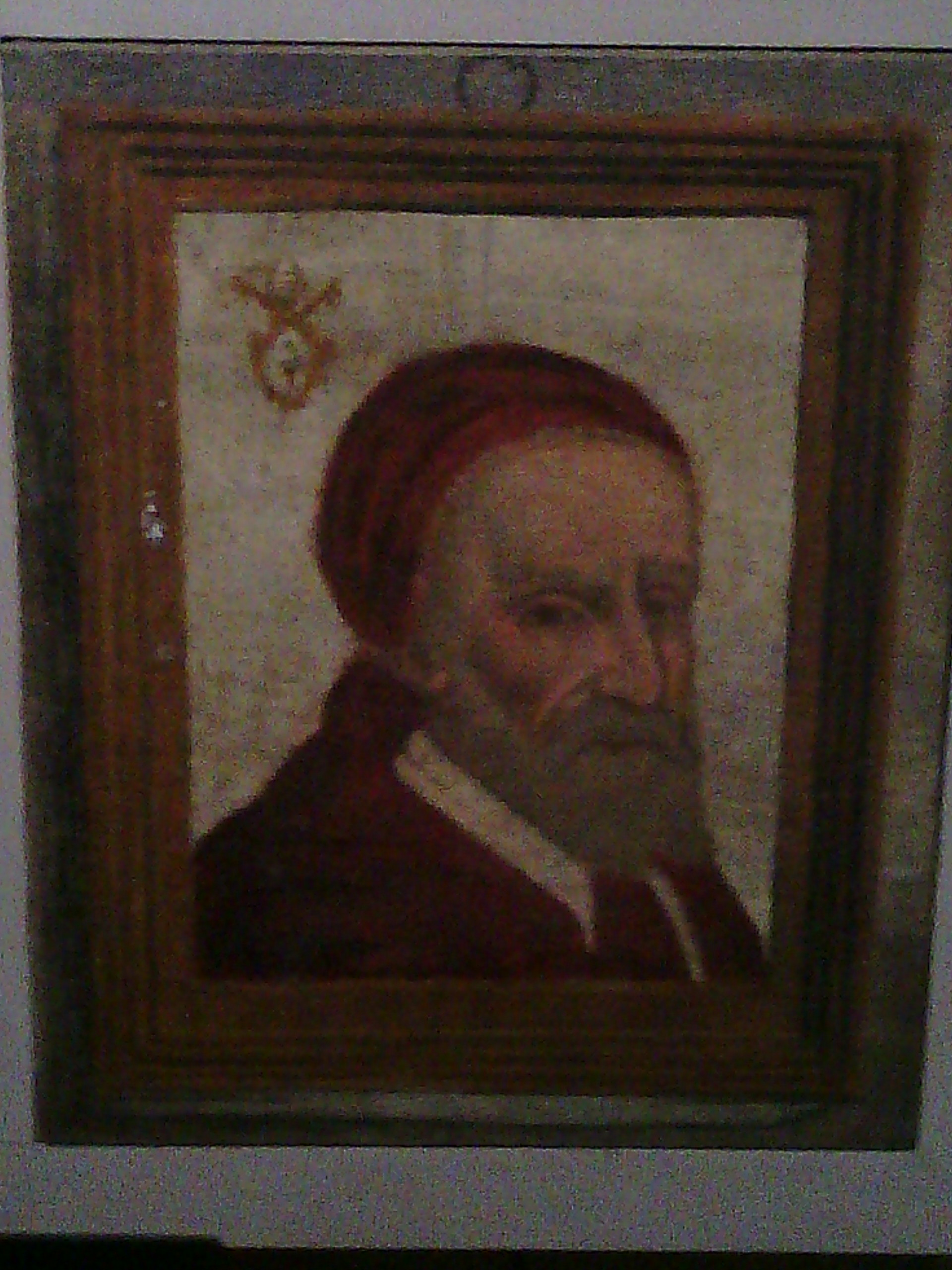 Affresco strappato dall'antica chiesa parrocchiale di Boffalora sopra Ticino (MI) - Italy. Esso raffigura papa Gregorio XIII